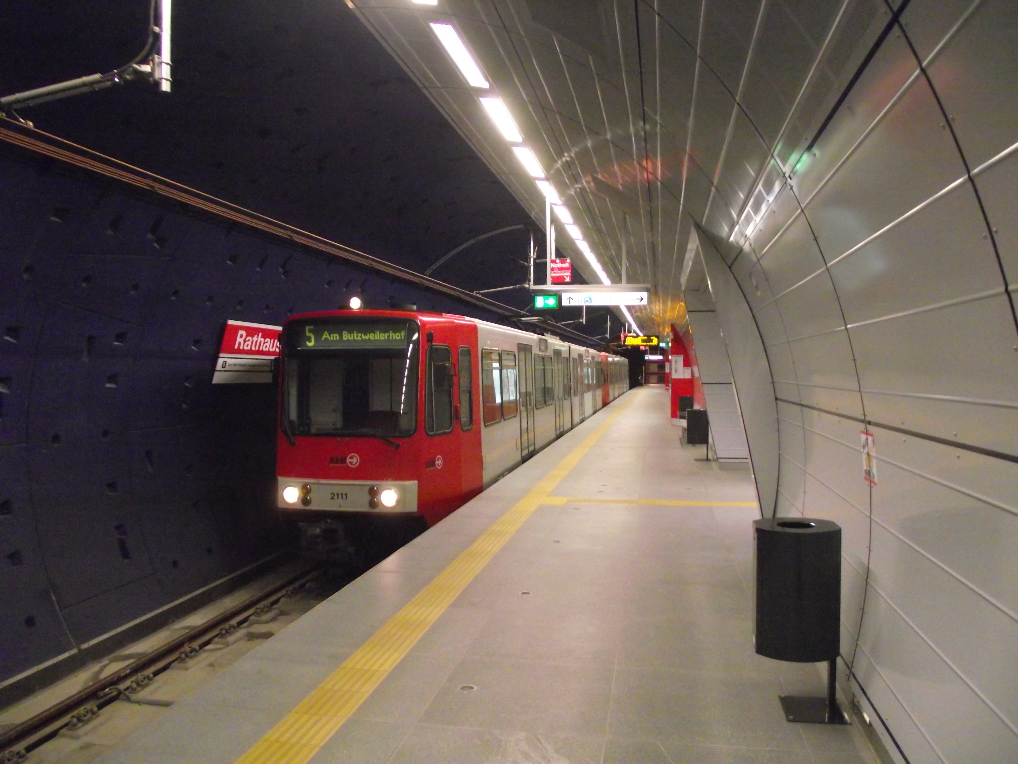 Ondergronds eindpunt van lijn 5 bij Rathaus.